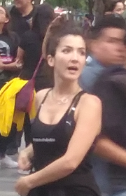 Eréndira Ibarra, actriz mexicana